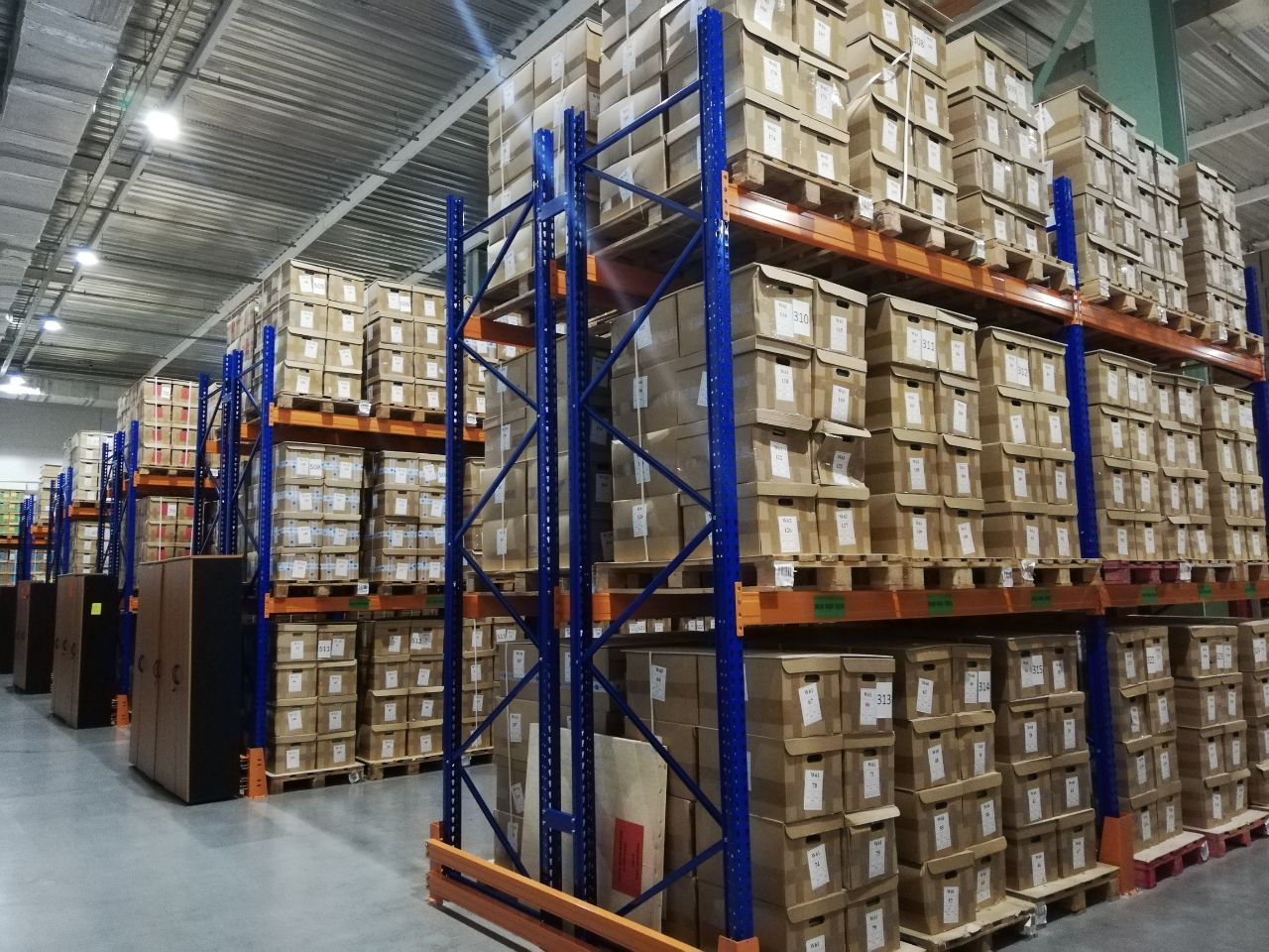 Временное хранилище библиотеки Политехнического музея в технополисе на АЗЛК